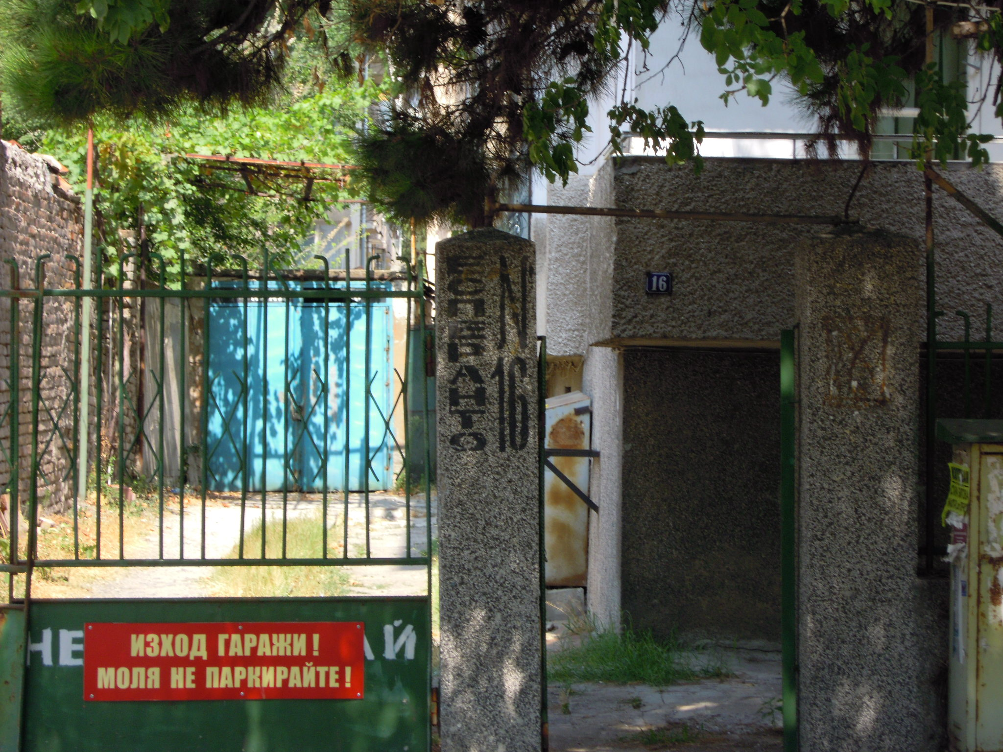 Улица Пиротска (бывшая Эсперанто) в Бургасе. Единственная сохранившаяся надпись с прежним названием улицы, на столбе калитки дома №16.